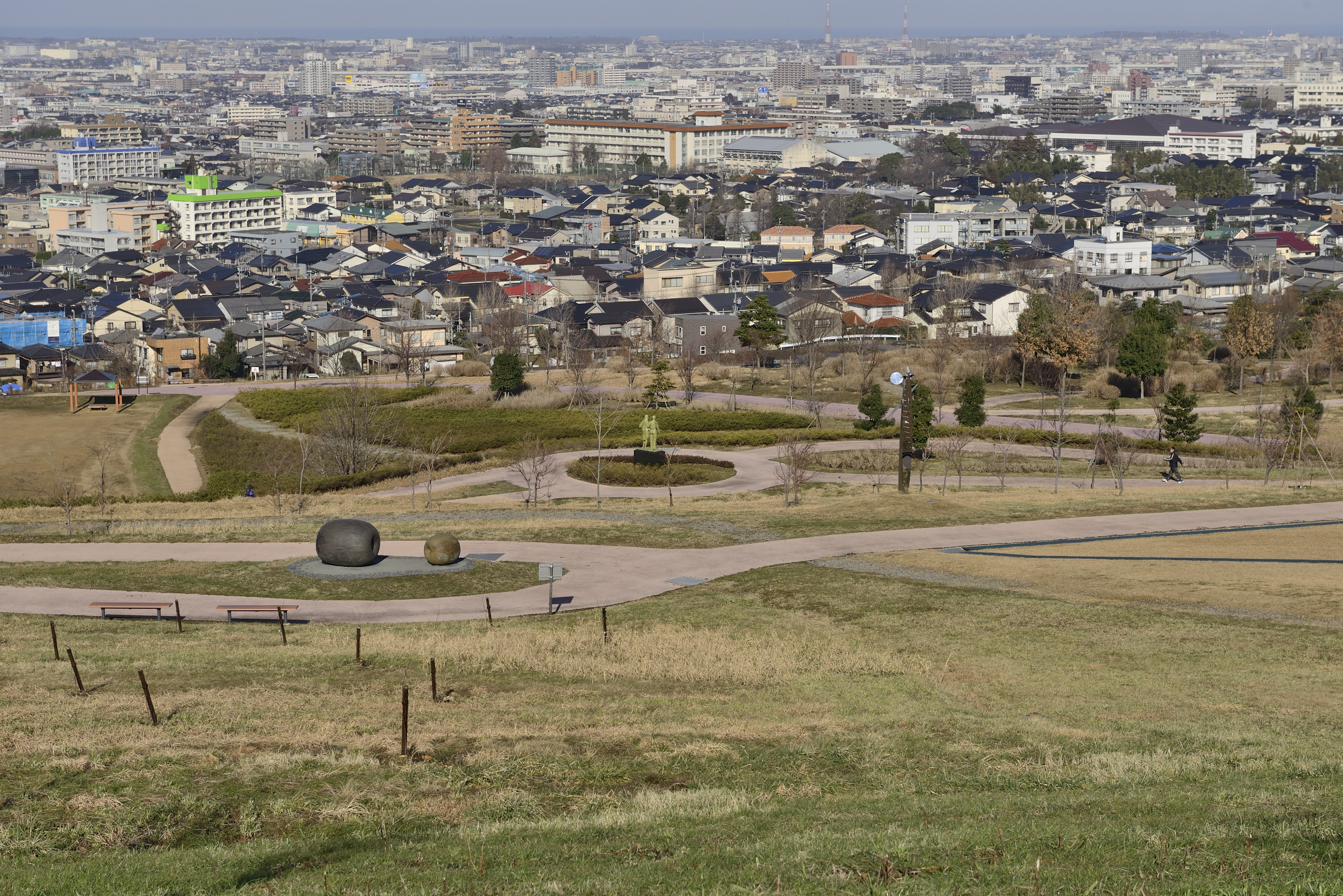 大乗寺丘陵公園